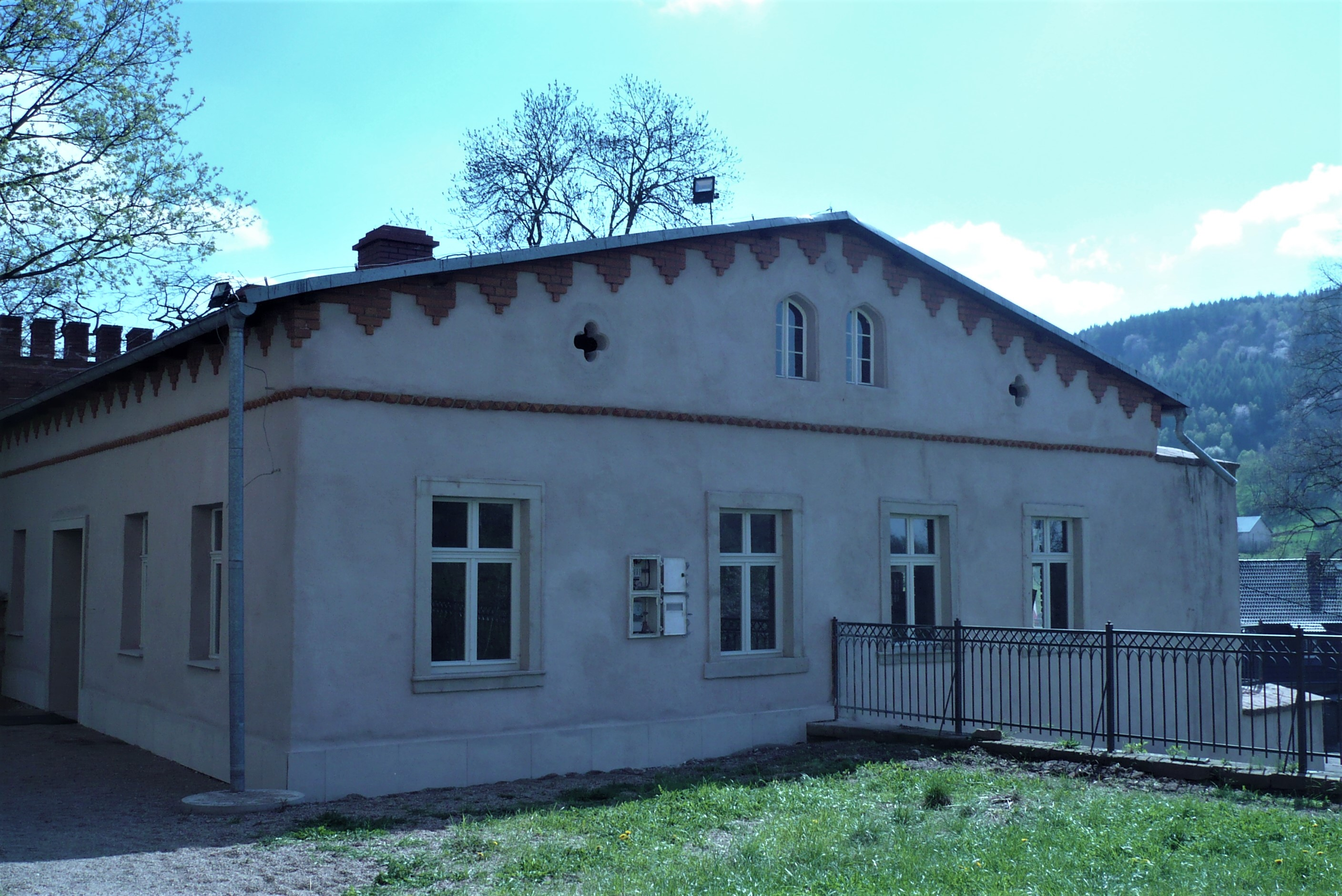 Ścinawka Górna. Budynek bramny